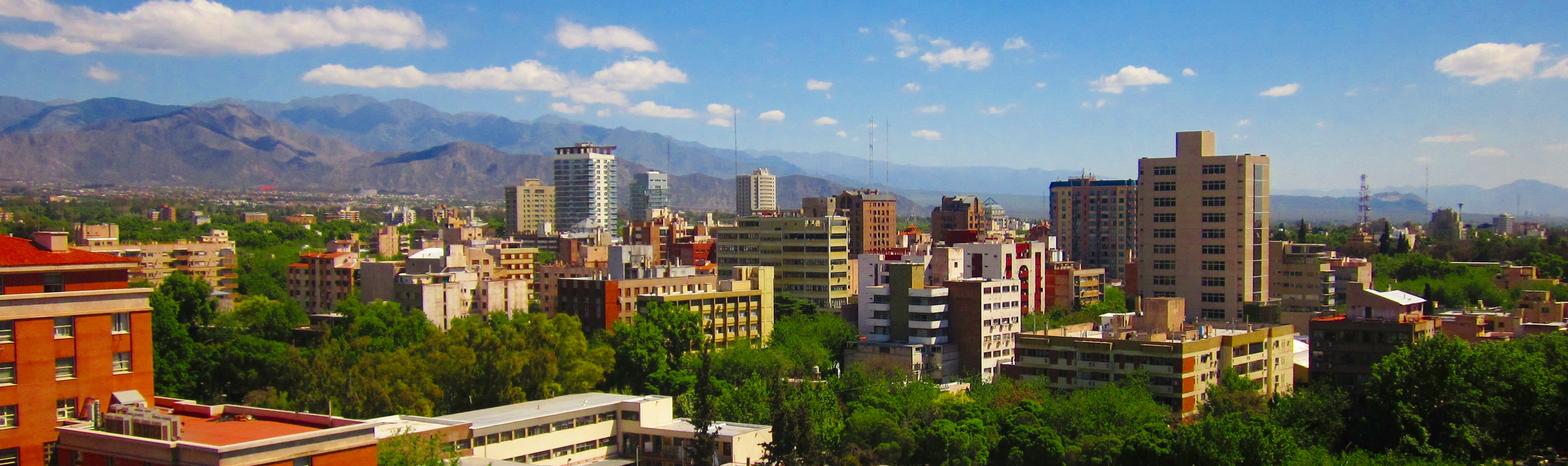 Vista panorámica del sector más moderno de la ciudad, donde se encuentran algunas de las torres más altas y se puede observar la gran forestación de árboles y parte del cordón montañoso de Los Andes.